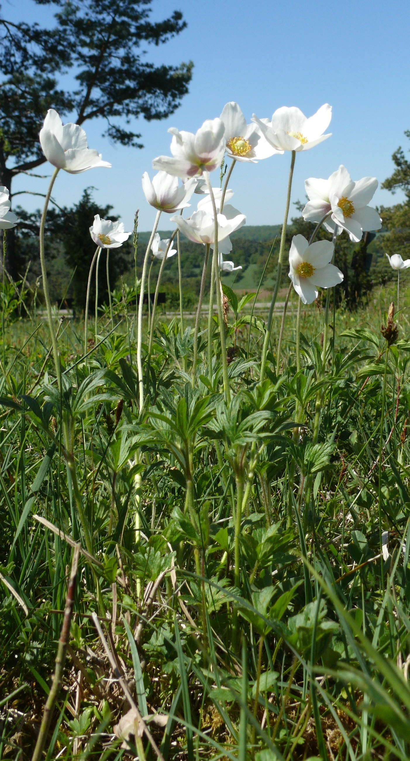 Anemone sylvestrisTaubergrund, Baden-Württemberg, Deutschland